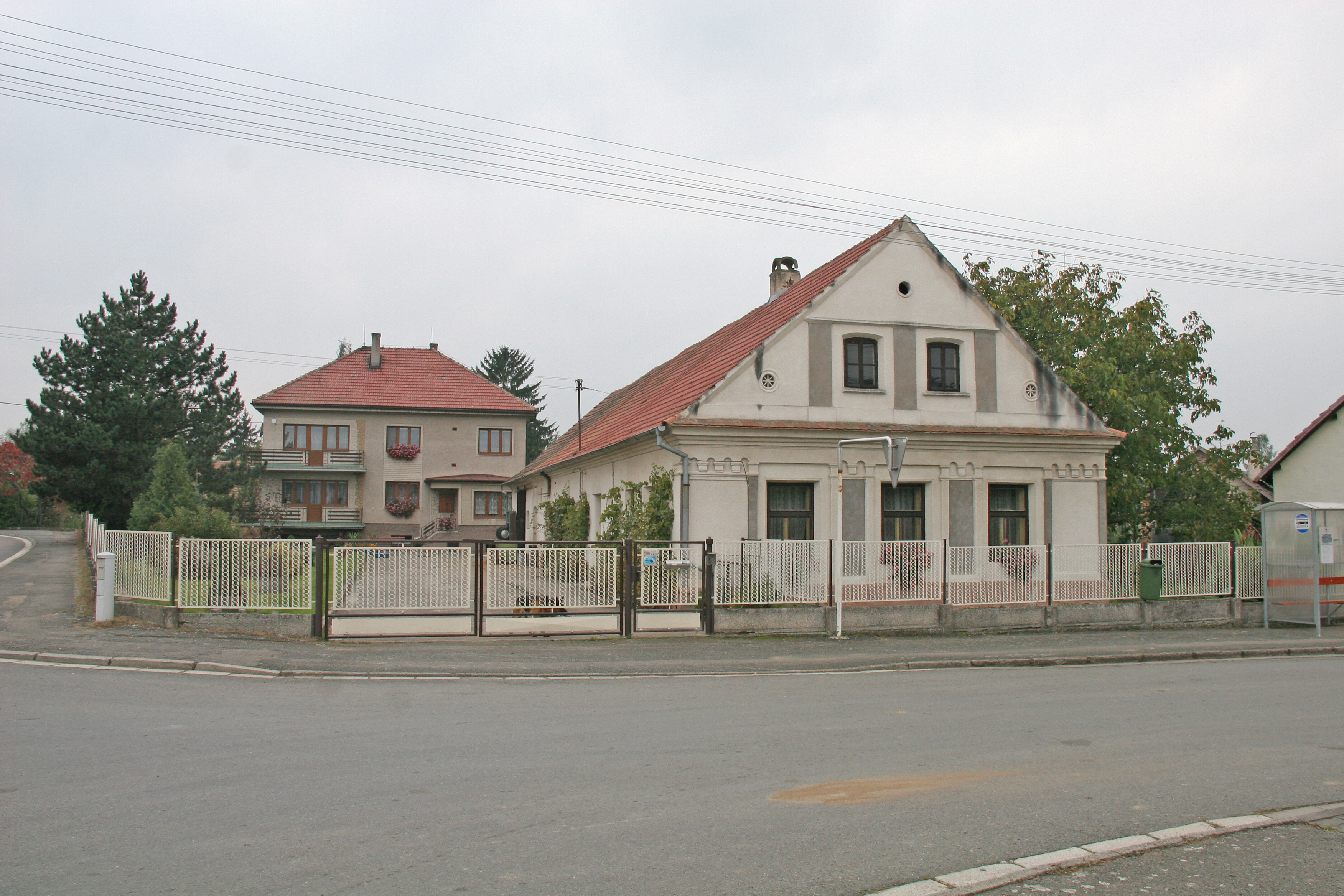 Ledce čp. 2